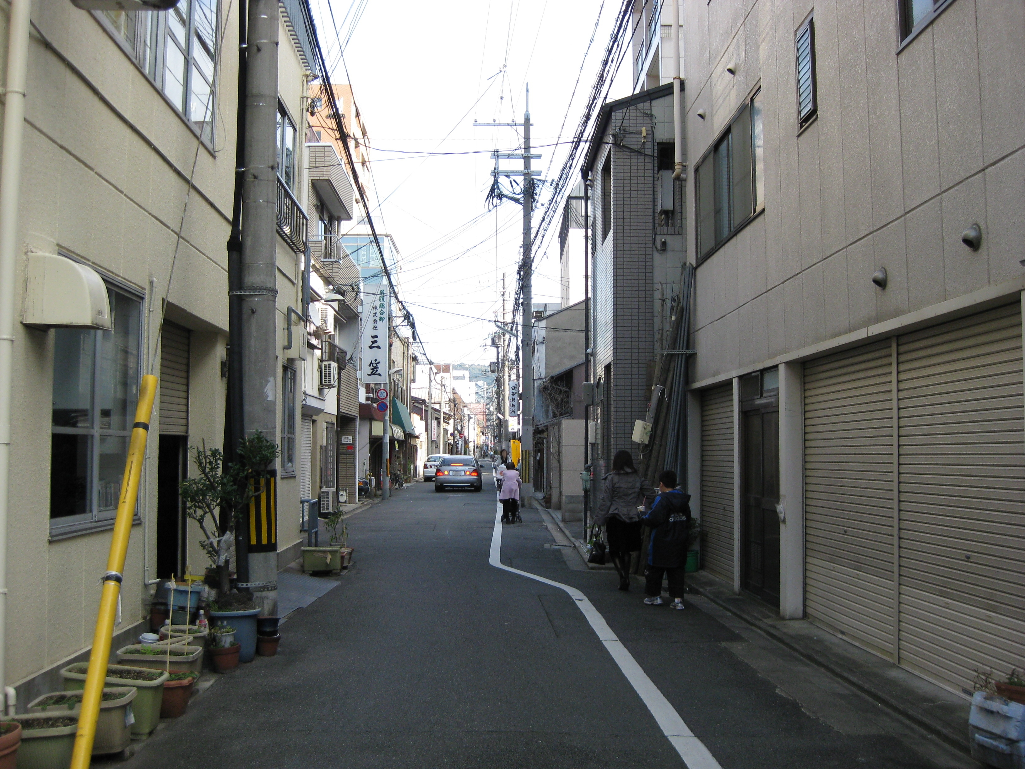 万寿寺通。東洞院通付近から東方向